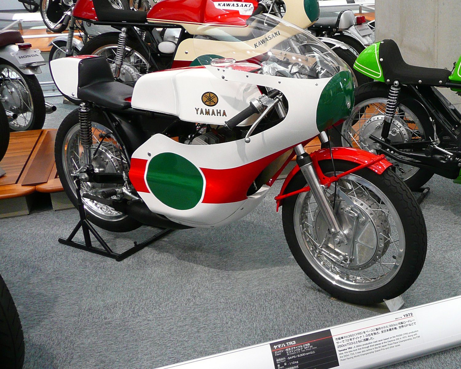 ヤマハの350cc市販ロードレーサーであるヤマハ・TR3（1972年） ホンダコレクションホールにて撮影